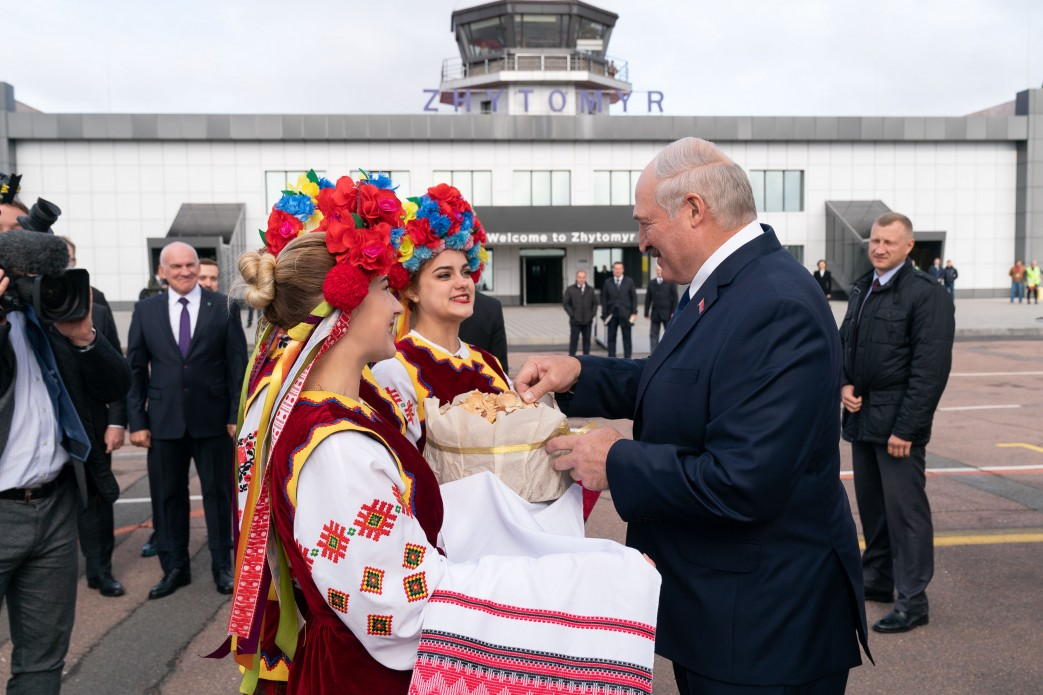 Володимир Зеленський зустрівся з Олександром Лукашенком у рамках Другого форуму регіонів України та Білорусі в Житомирі